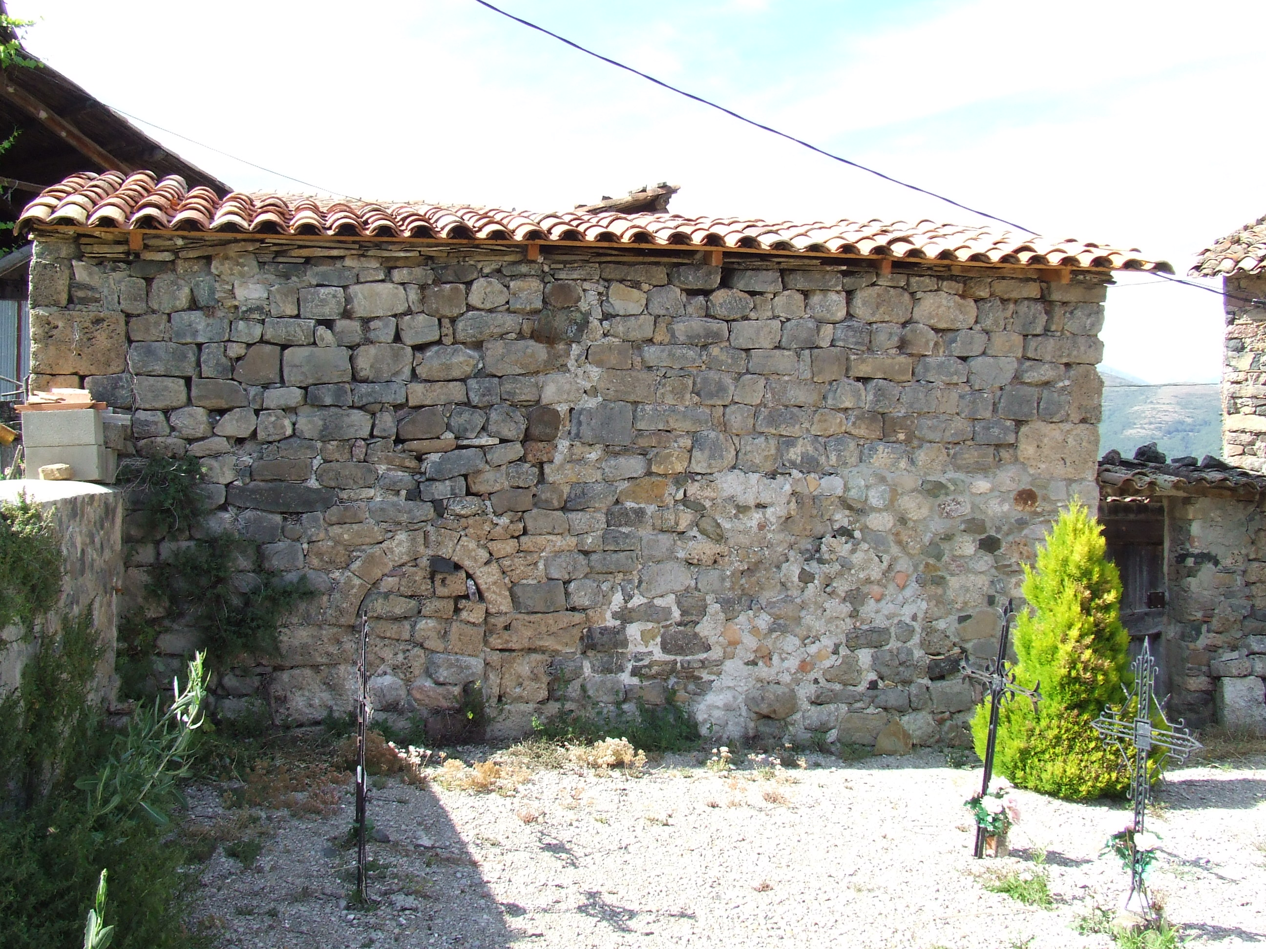 Façana meridional de Sant Miquel de Naens (Senterada, Pallars Jussà)